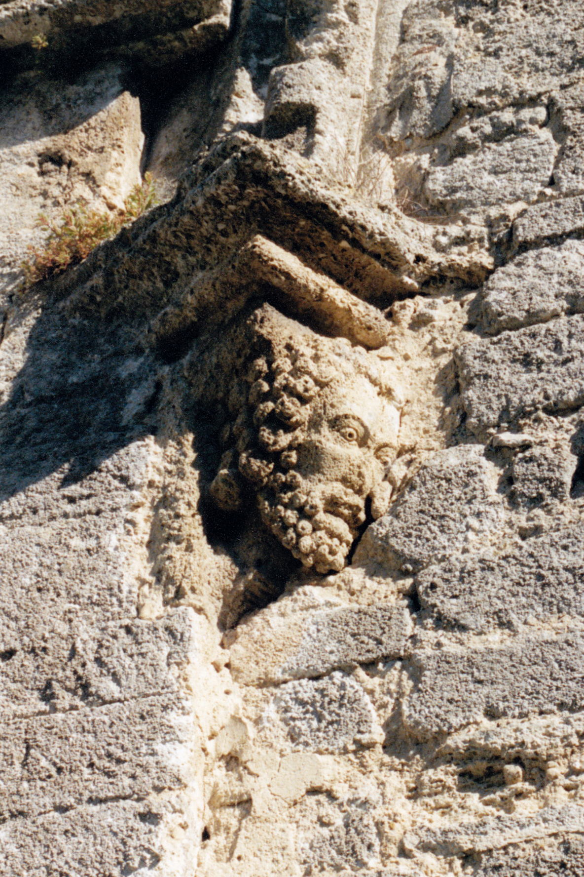 France - Languedoc - Hérault - Église Saint-Laurent de Lattes